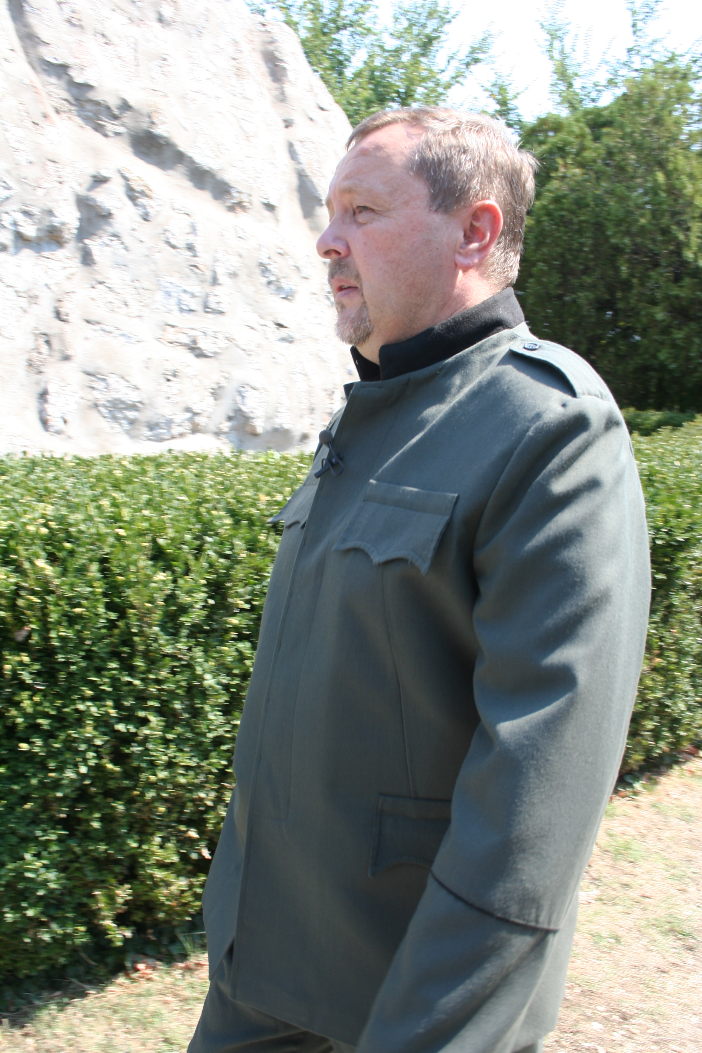 Državna proslava 103. godišnjice Cerske bitke, 2017. Tekeriš